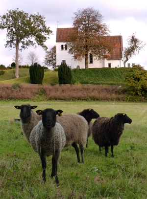 Pedersborg Kirke, set fra volden vest for kirken